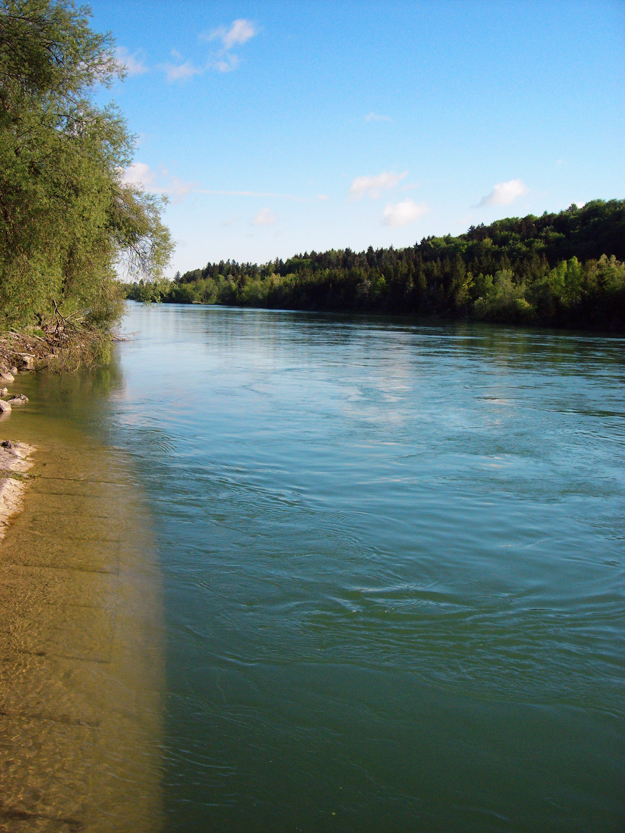 River Lech, unterhalb der Staustufe bei Seestall, Gemeinde Fuchstal, Germany